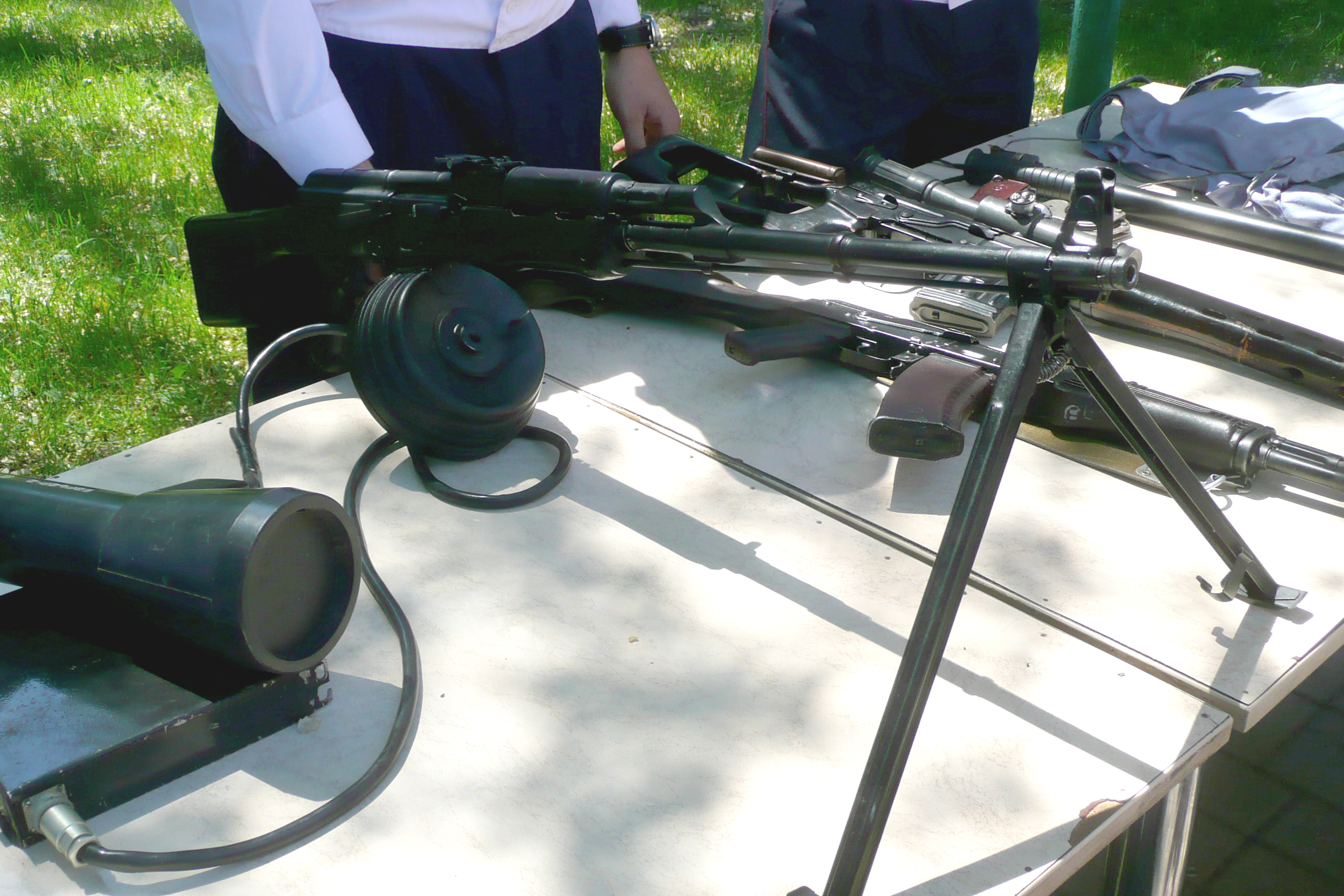 День защиты детей в Донецке